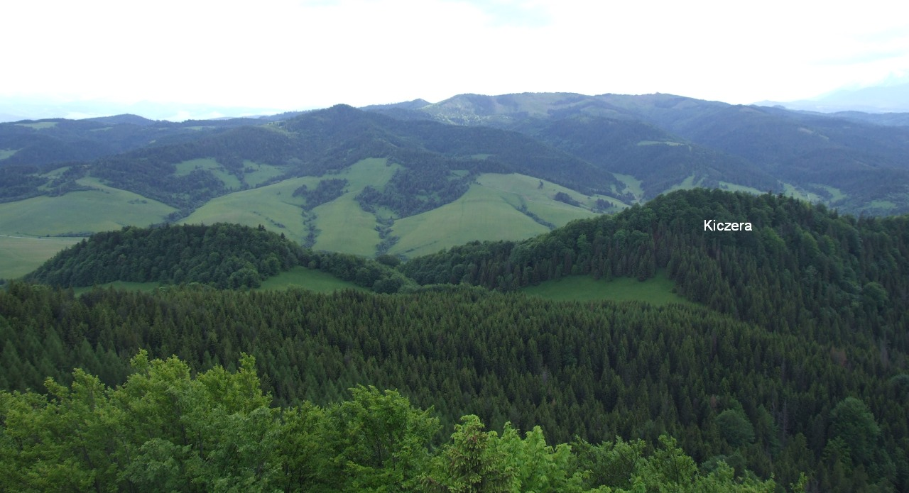 Kiczera i Magura Spiska. Widok z Wysokich Skałek